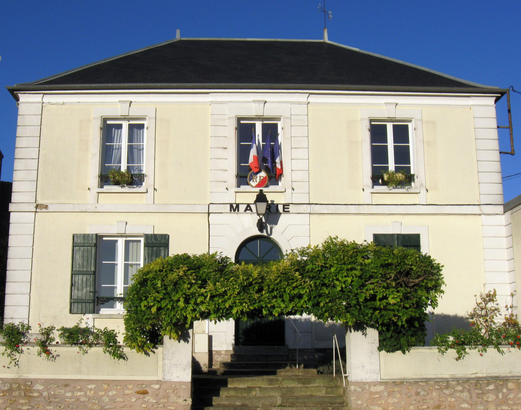 Mairie de Lescherolles (département de la Seine-et-Marne, région Île-de-France).